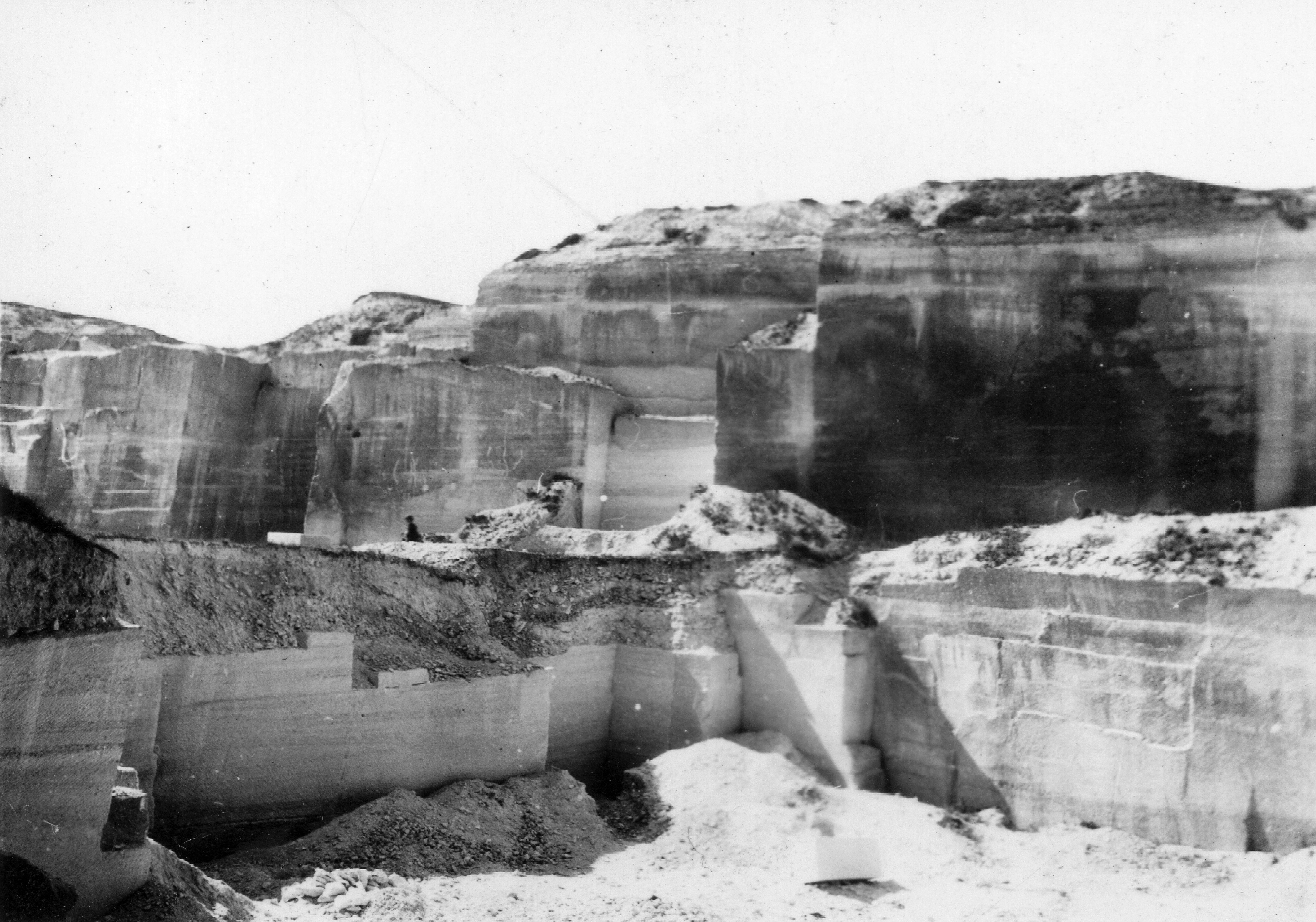 Kőfejtő. Location: Hungary, Fertőrákos Title: Kőfejtő.